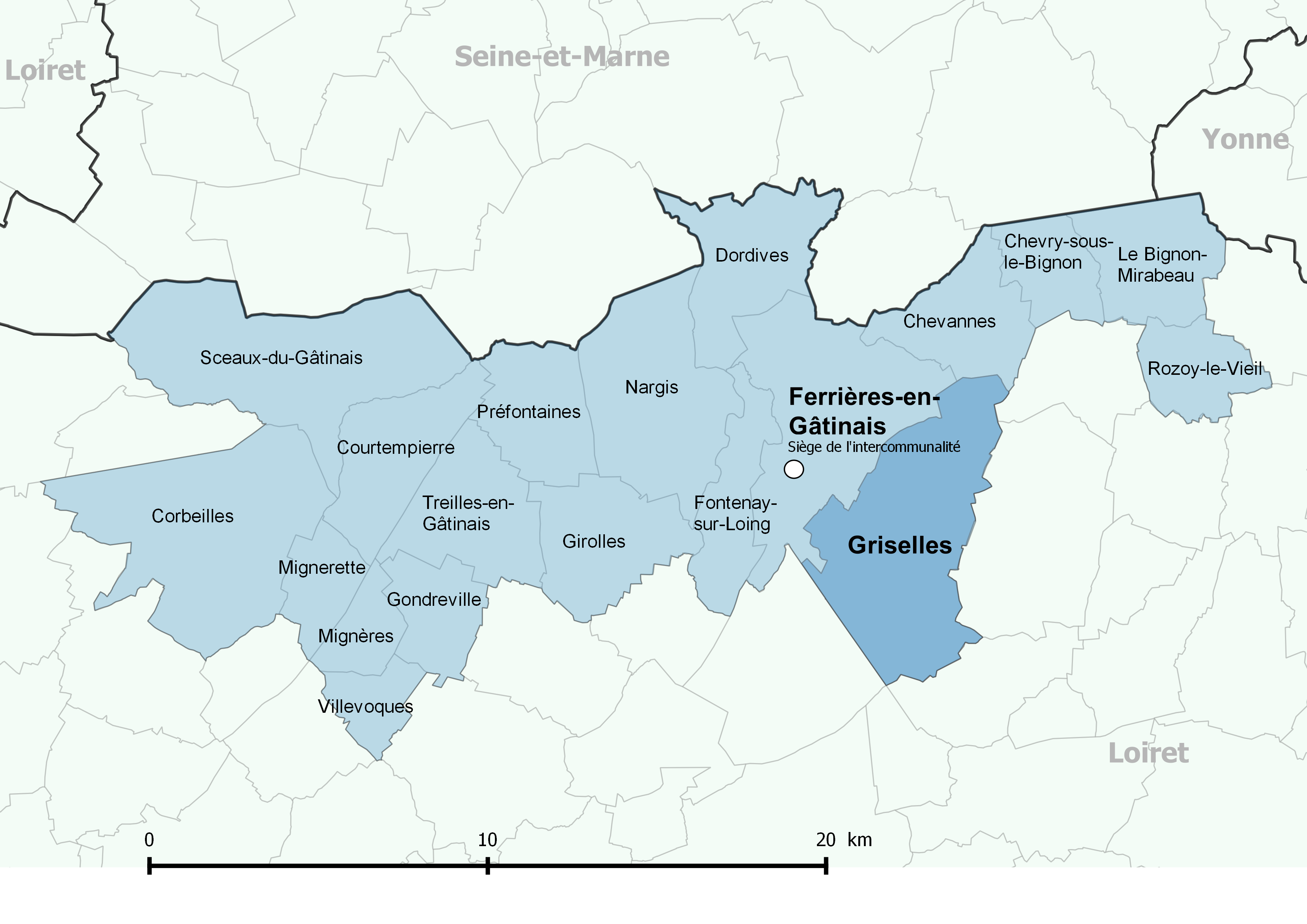 Périmètre de la communauté de communes des Quatre Vallées (Loiret) - Positionnement de la commune de Griselles.